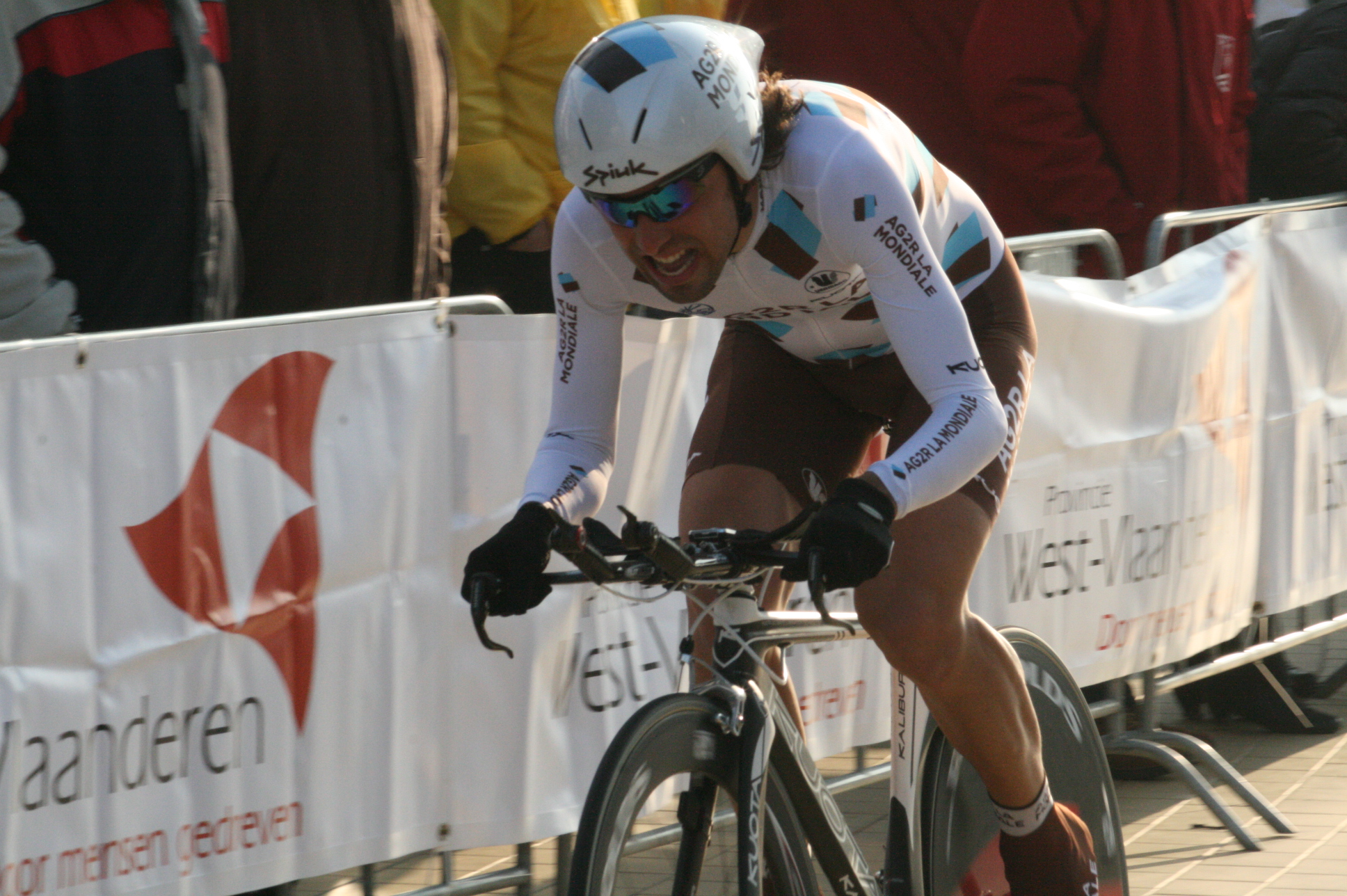 Driedaagse van West-Vlaanderen 2011, proloog in Middelkerke